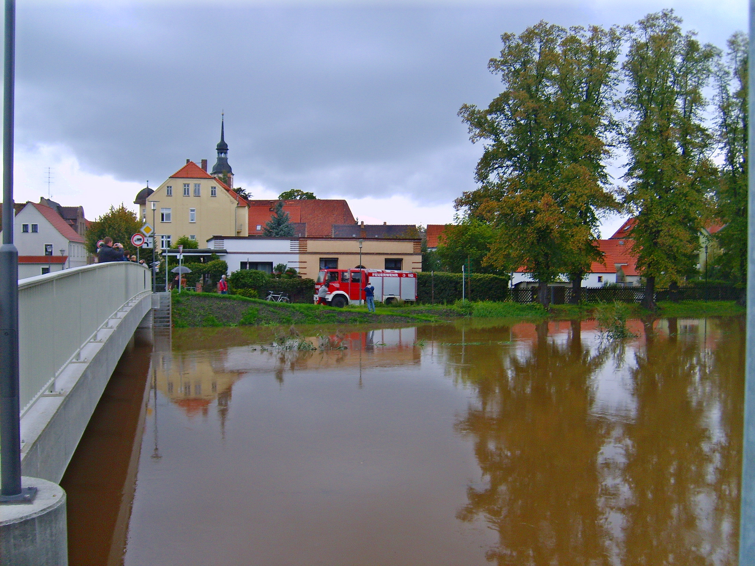 Das Jahrhunderthochwasser an der Schwarzen Elster in Elsterwerda im Herbst 2010.